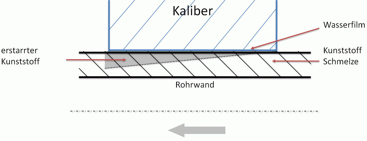 Schematische Skizze einer Nasskalibrierung für die Extrusion von Kunststoff-Rohren.